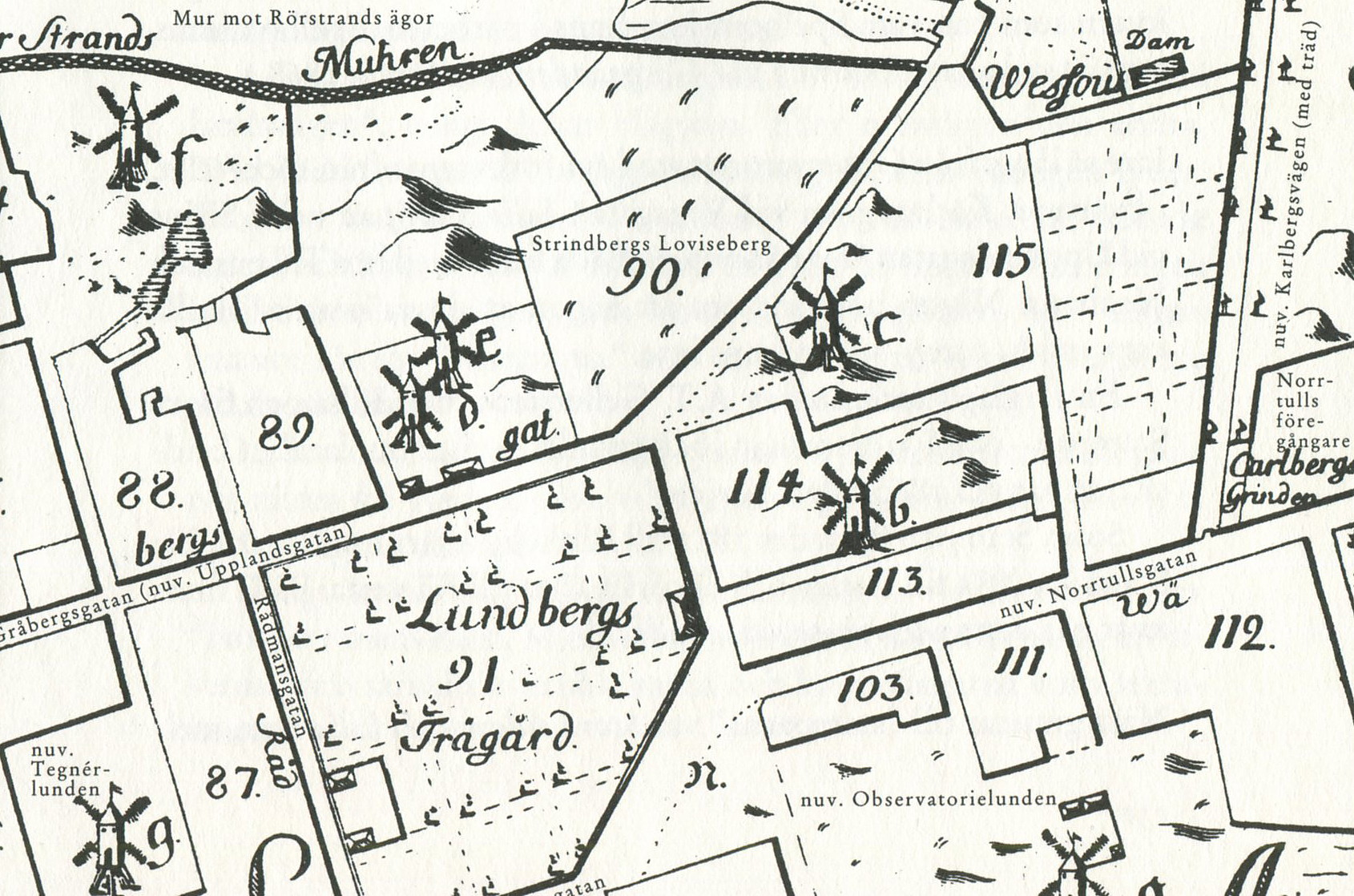 Kvarnar på Tillaeus' karta från 1733, vid Observatoriekullen. a är Spelbomskan (längs ner t.h.), b är Lilla Stampan, c är Stora Stampan, d är Stora Adam, e är Lilla Eva, f är Rörstrandskvarnen och g är den äldre Barnhuskvarnen.